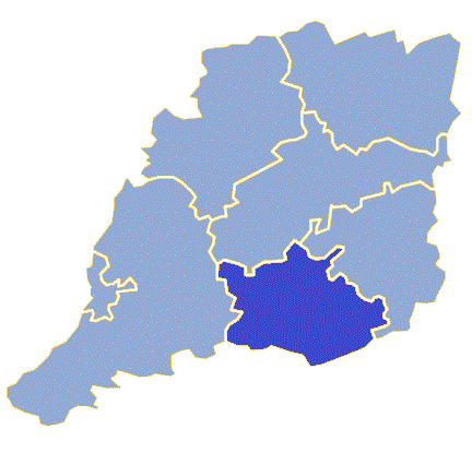 Powiat krośnieński (województwo lubuskie) - Gmina Bobrowice